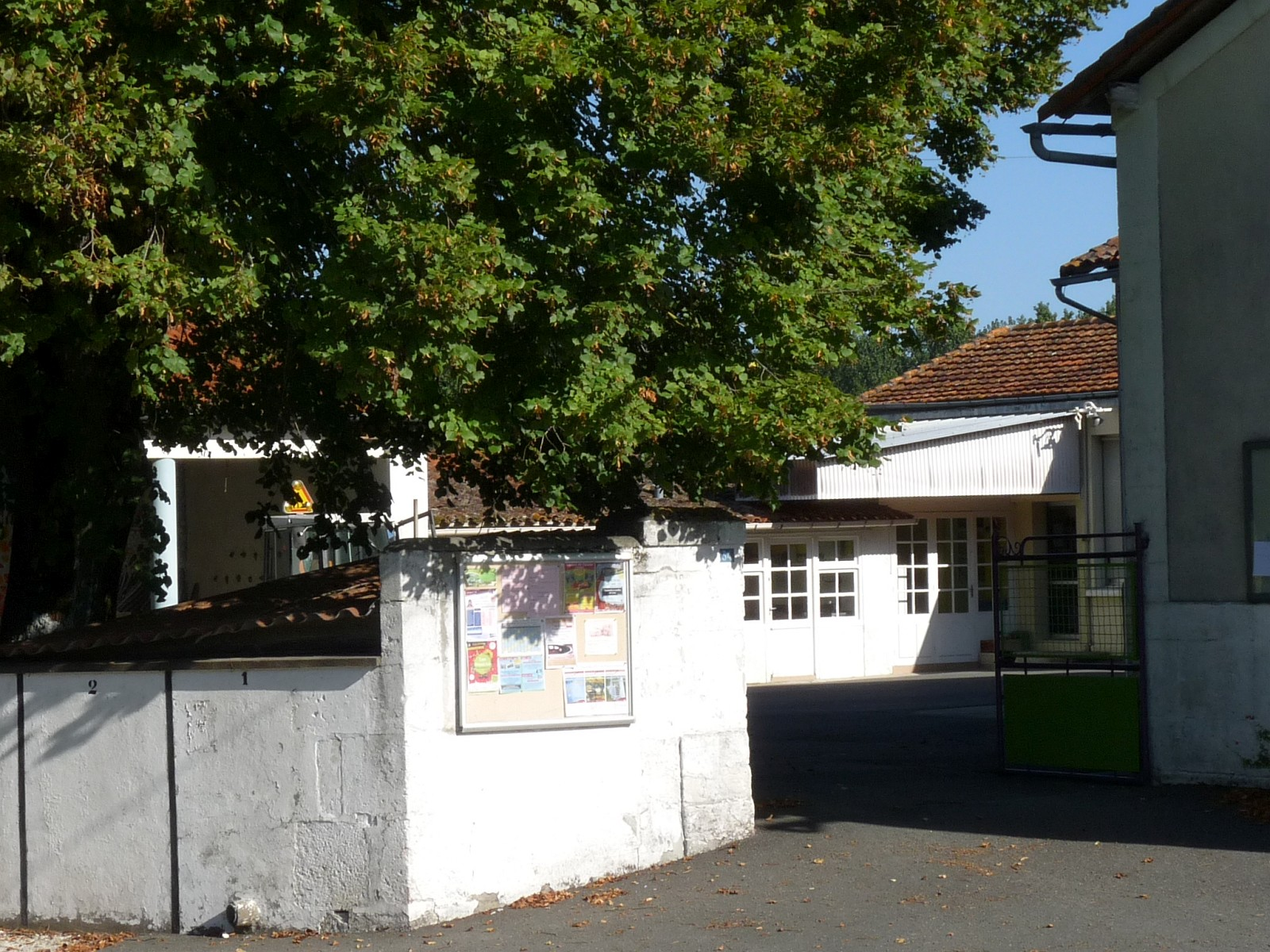 Ecole de Celles, Charente-Maritime, France